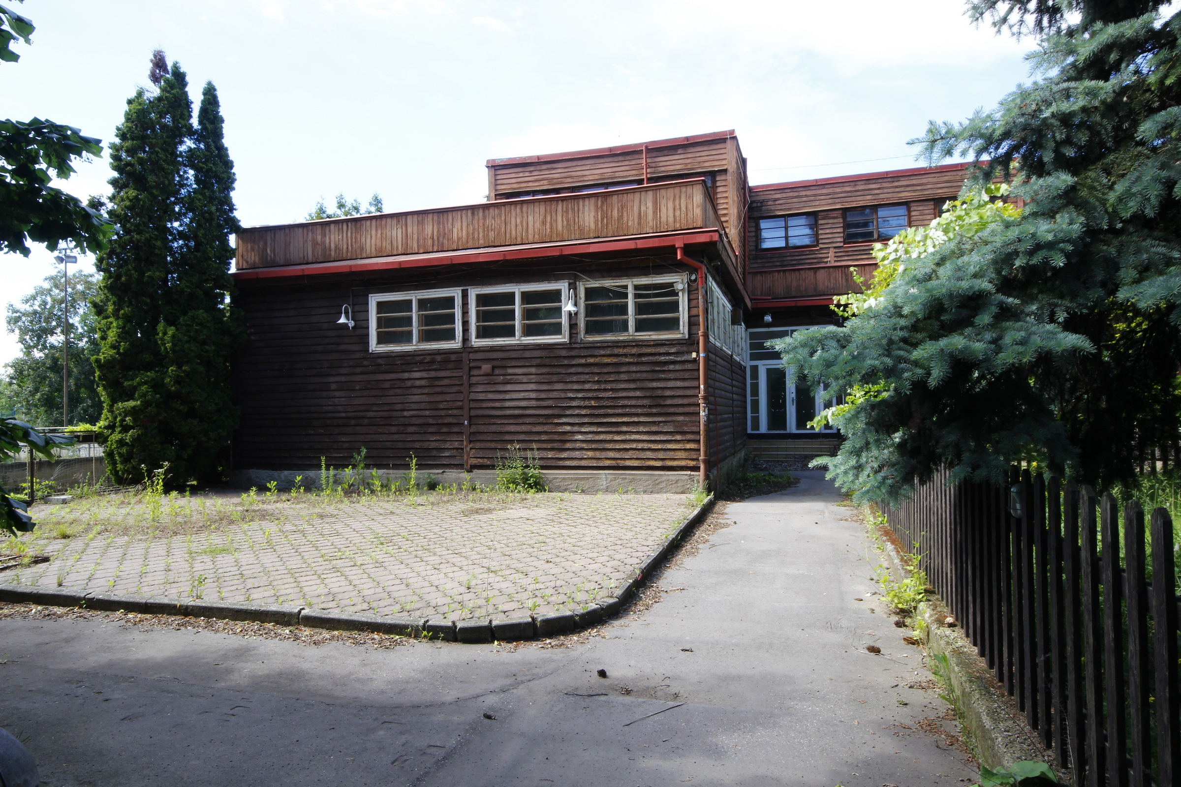 Bohumír Kozák: Klubovna LTC Praha, 1926